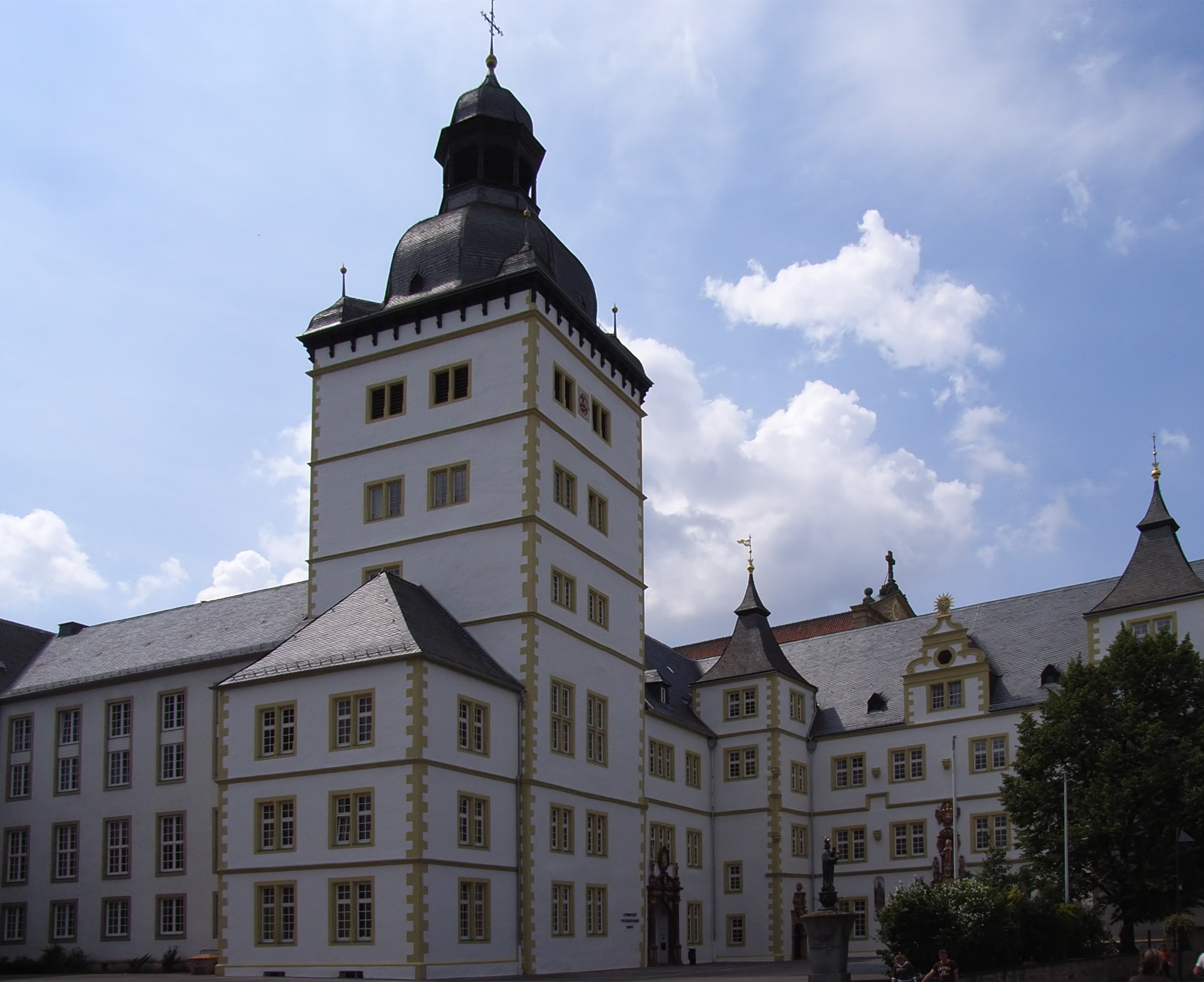 Paderborn, Deutschland: Gymnasium Theodorianum.